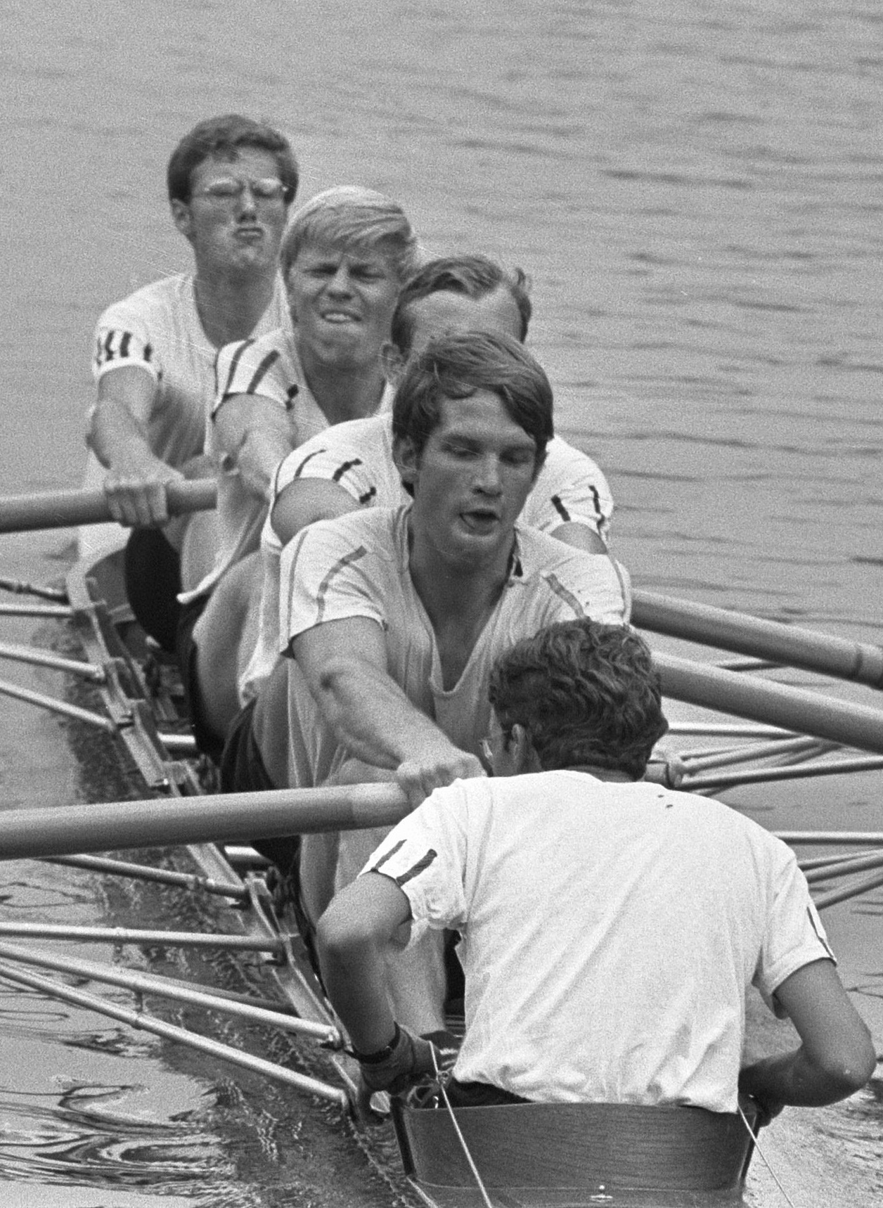 Vier met stuurman van Nereus, van onder naar boven Koning (stuurmann), Van Enst, Reesink, Constandse, Veenemans